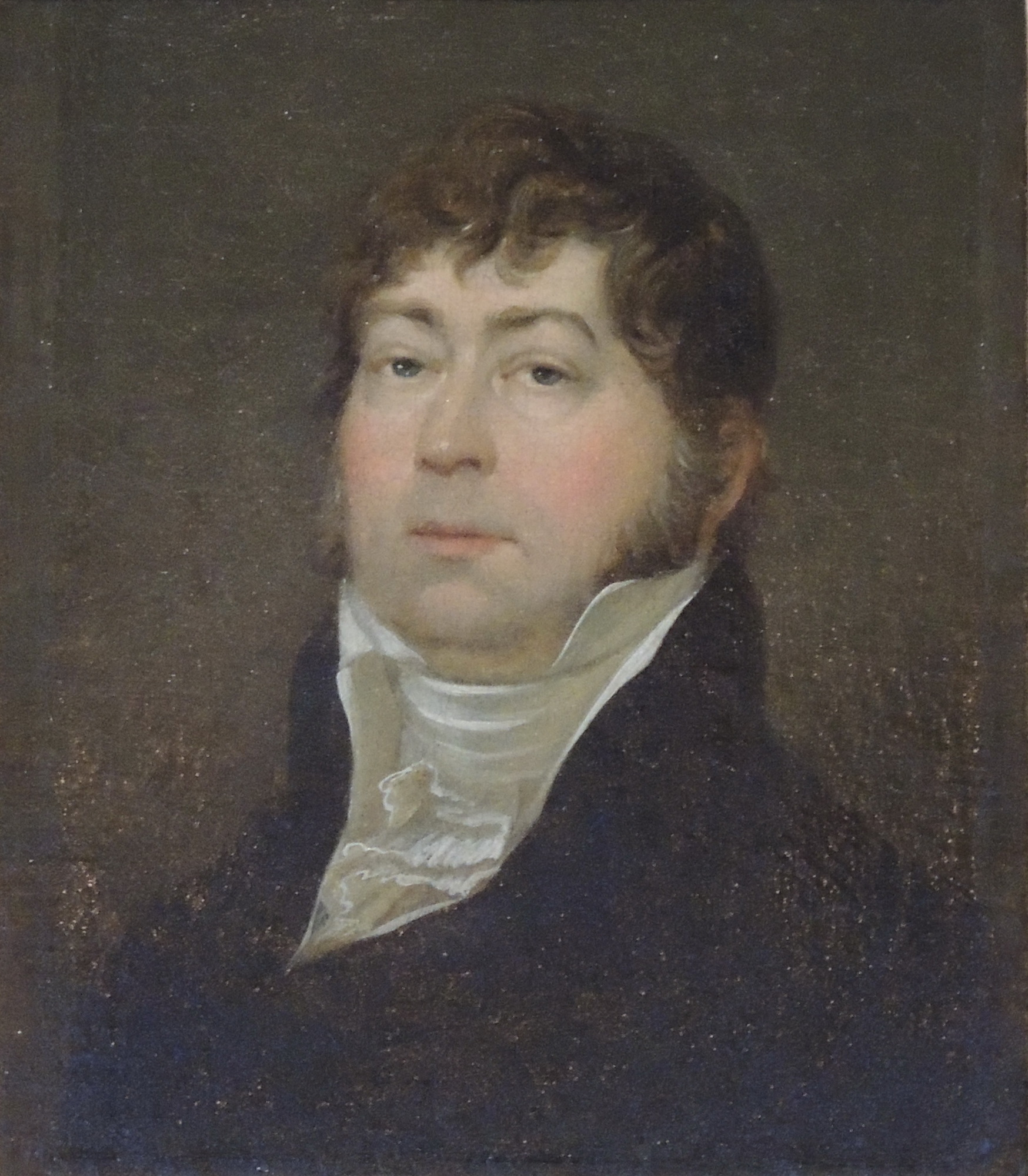 Портрет В.Л. Пушкина. Неизвестный художник. Холст, масло. 1810-е